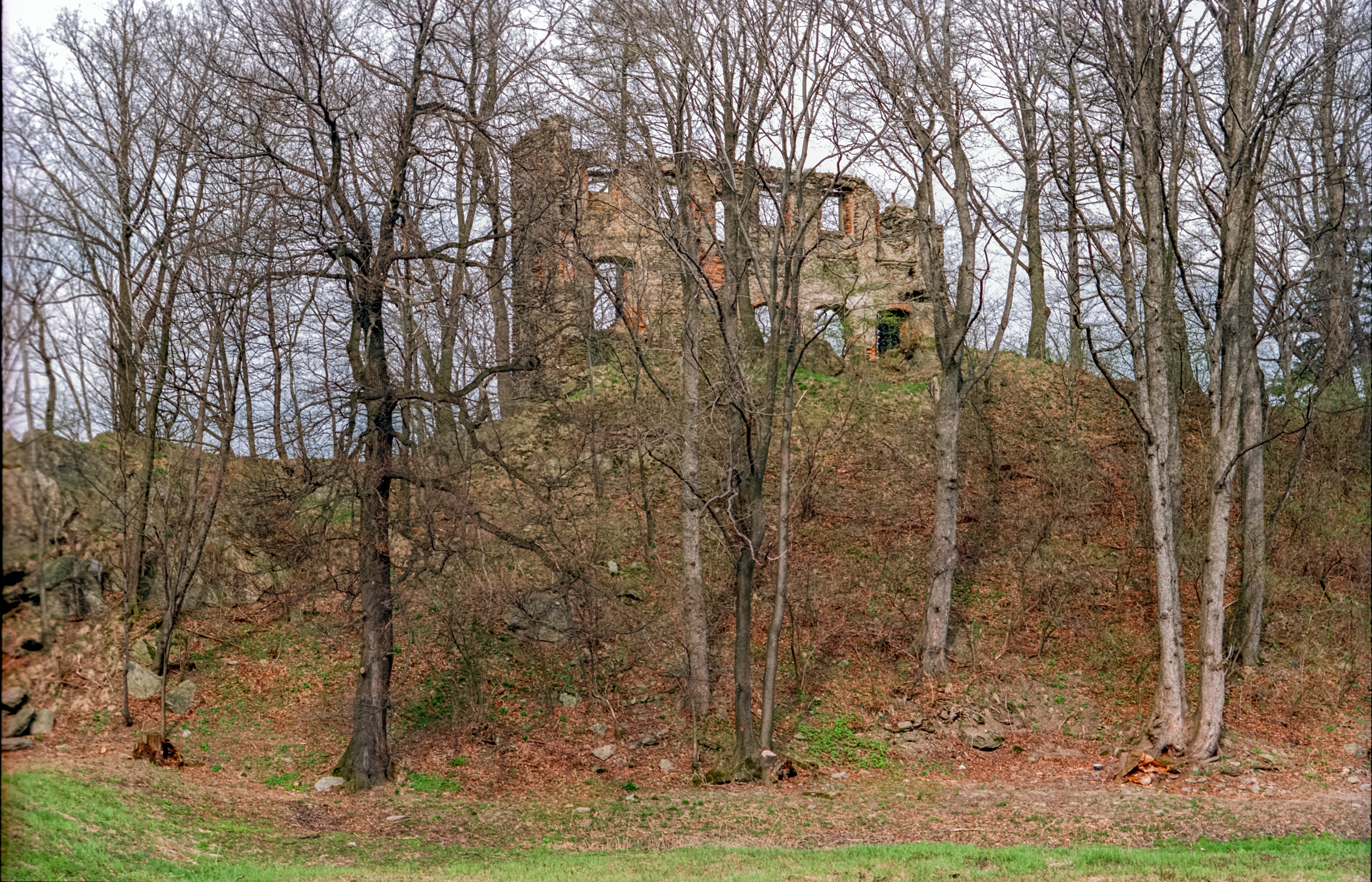 Rybnica